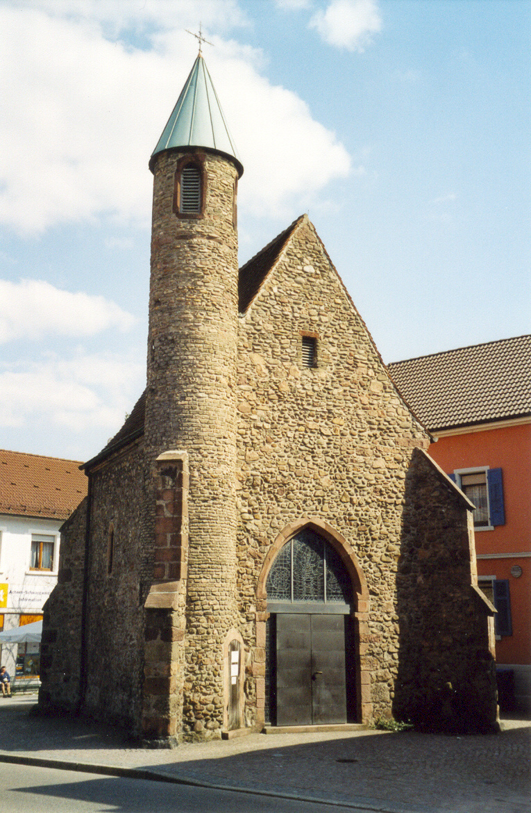 Acherns gotische Nikolauskapelle - schönstes Bauwerk der Stadt.